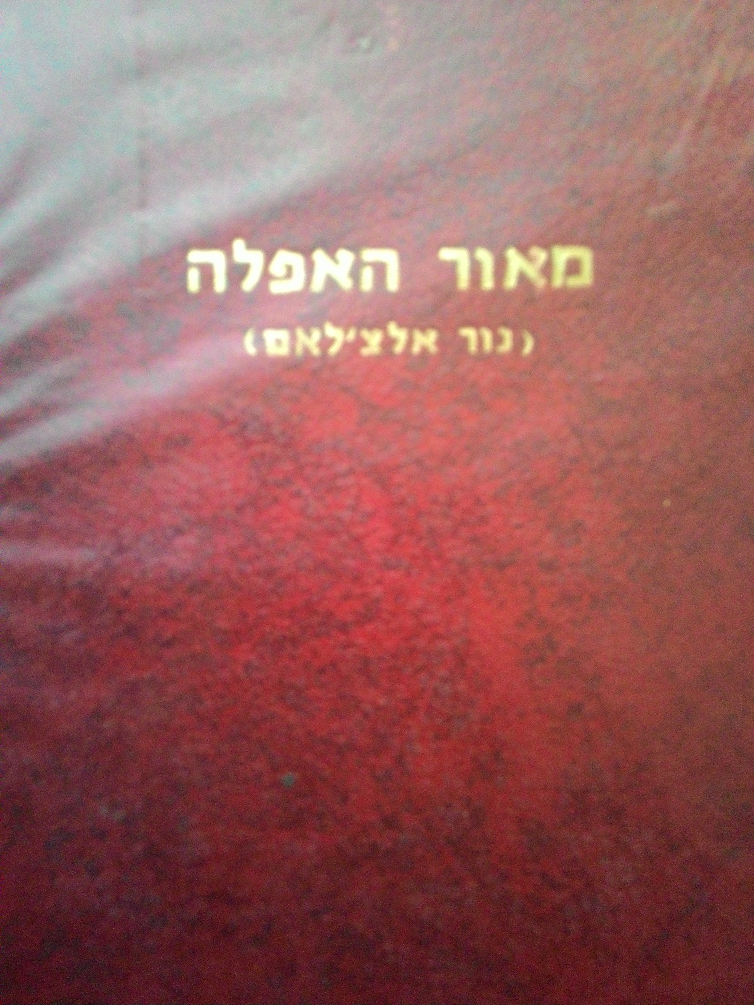 כריכת הספר מאור האפלה, בהוצאת האגודה להצלת גנזי תימן תשי"ז